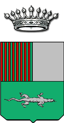 riproduzione